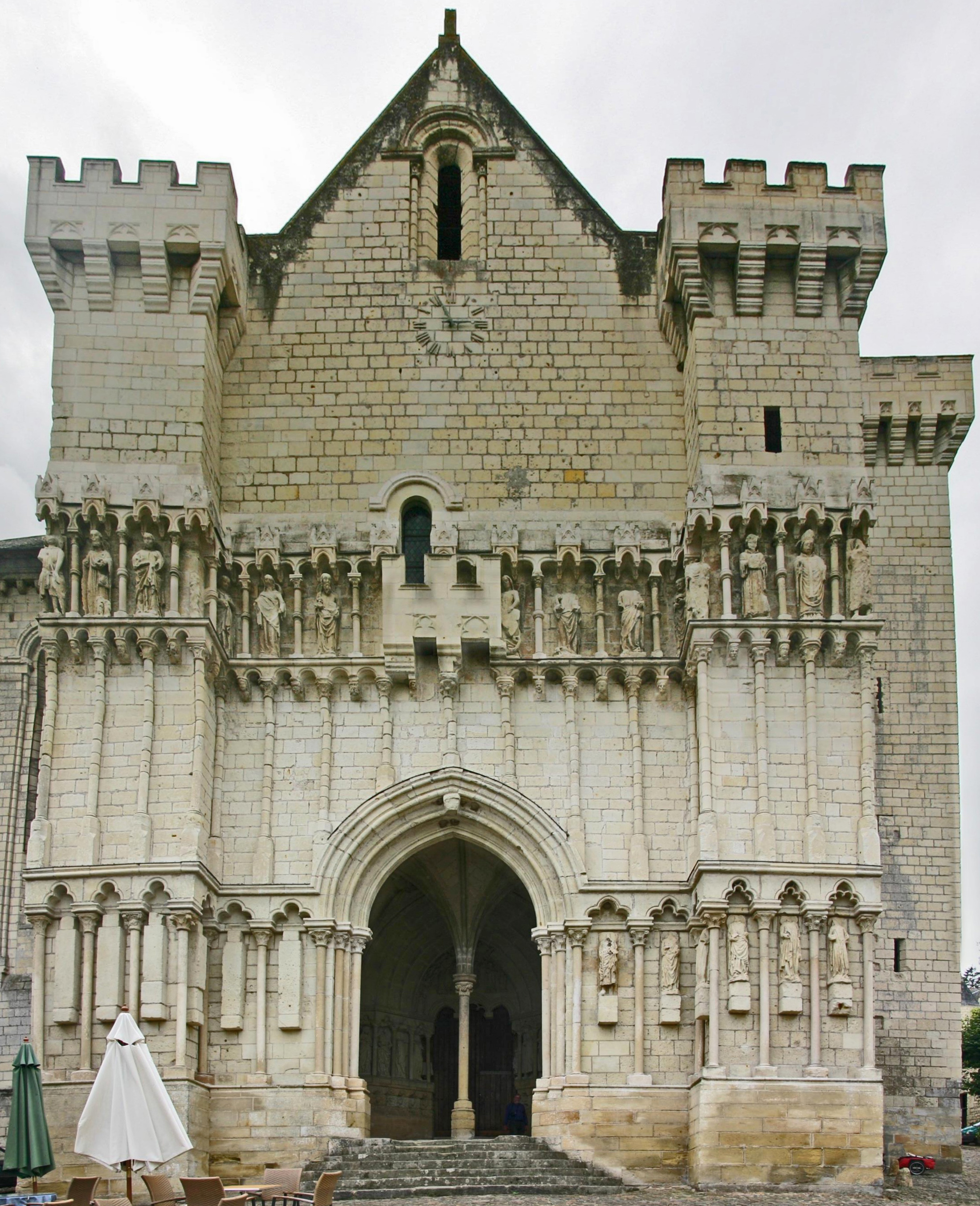 Candes-Saint-Martin